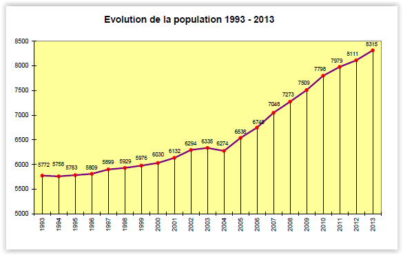 Evolution demographique de Fully